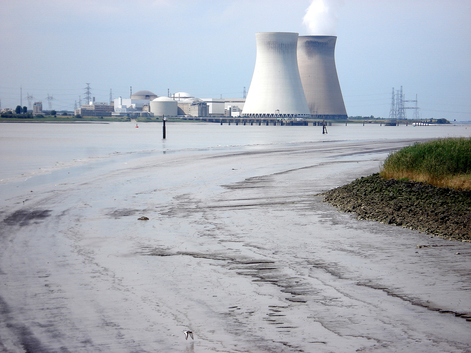 Doel (gem. Beveren, België). Kerncentrale, gezien vanop Fort Lillo op tegenoverliggende Schelde-oever. Doel (prov. de Flandre-Orientale, Belgique). Centrale nucléaire vue de Lillo-Fort sur la rive opposée de l'Escaut.